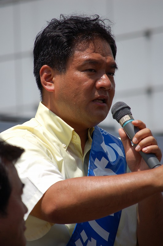 川崎駅前にて演説する金子洋一氏